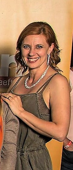 Avant-première seizoensfinale familie